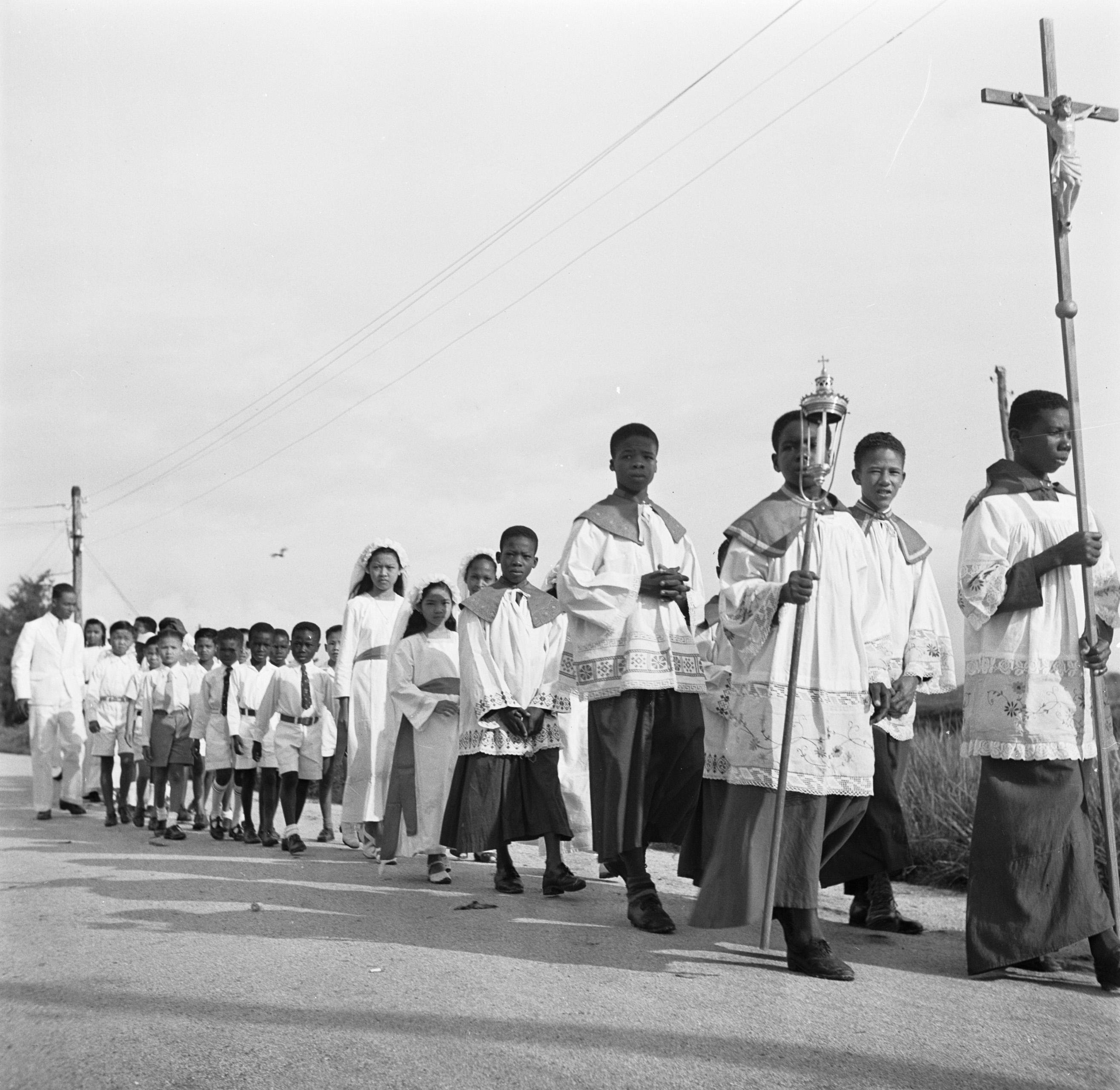 Collectie / Archief : Fotocollectie Van de Poll Reportage / Serie : Reis naar Suriname en de Nederlandse Antillen Beschrijving : Een stoet van schoolkinderen die hun eerste communie zullen gaan doen in de Rooms-katholieke kerk van Nieuw-Nickerie, voorafgegaan door misdienaars met kruis en processielantaarns Datum : 1947 Locatie : Nieuw-Nickerie, Suriname Trefwoorden : kinderen, liturgie, processies, religies, religieuze voorwerpen, sacramenten Fotograaf : Poll, Willem van de, [onbekend] Auteursrechthebbende : Nationaal Archief Materiaalsoort : Negatief (zwart/wit) Nummer archiefinventaris : bekijk toegang 2.24.14.02 Bestanddeelnummer : 252-5480